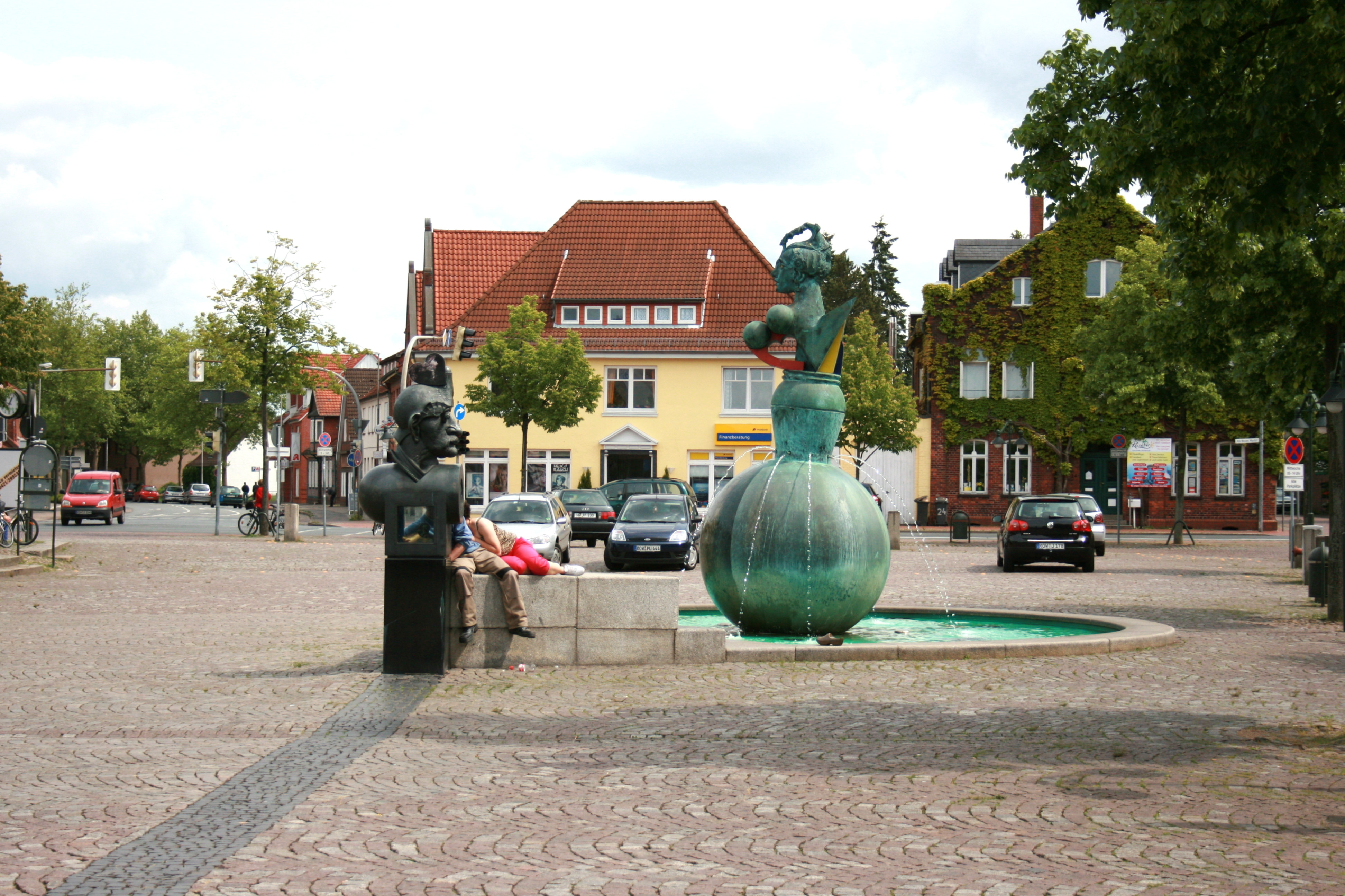 Paar-oh-die (Brunnenanlage), Große Straße in Rotenburg (Wümme)